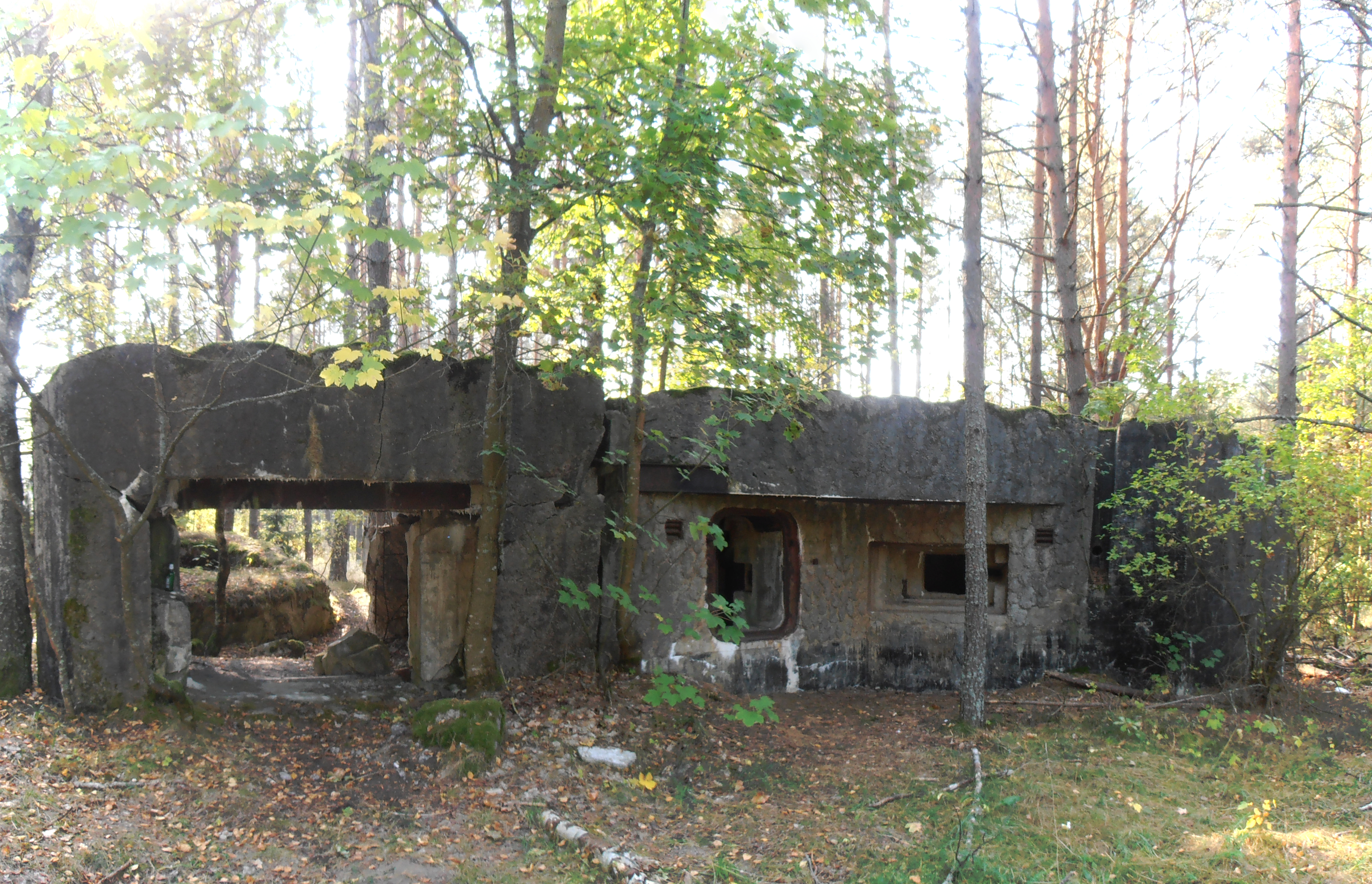 Bunkier w miejscowości Czarny Piec k. Jedwabna